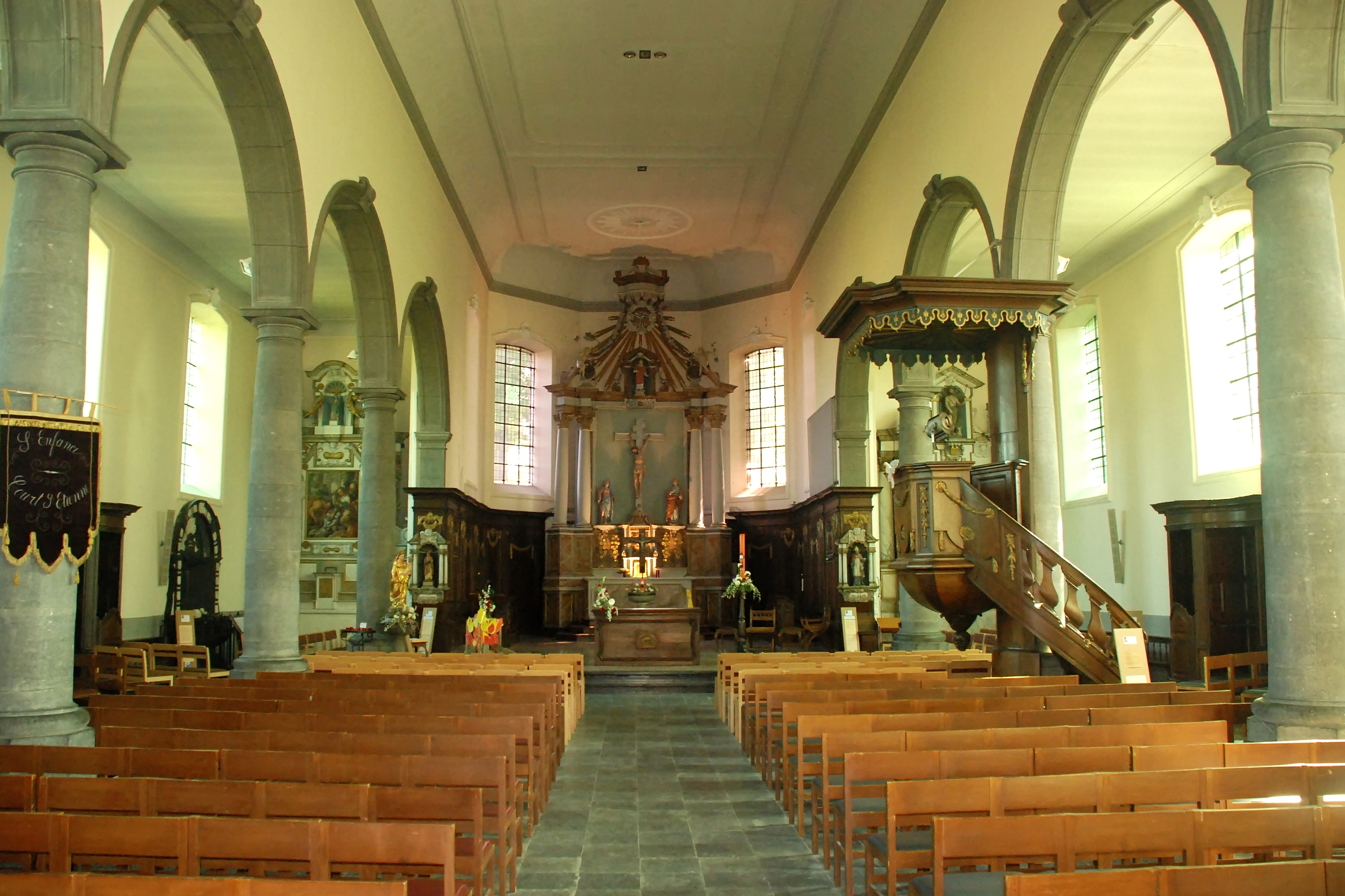 Belgique - Brabant wallon - Église de Court-Saint-Étienne